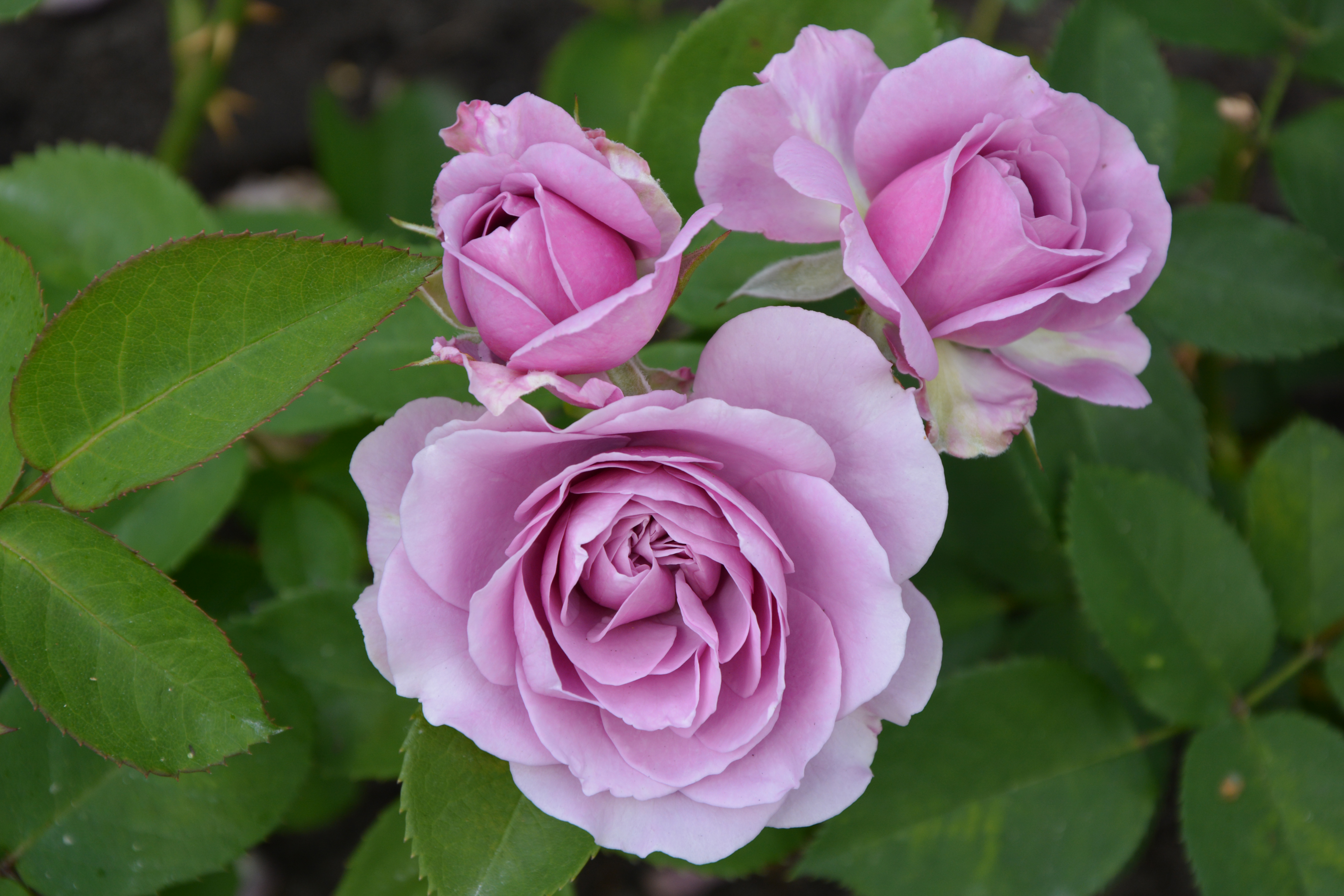 Patiorose Lavender Ice (Tantau 2012) im Rosarium Uetersen